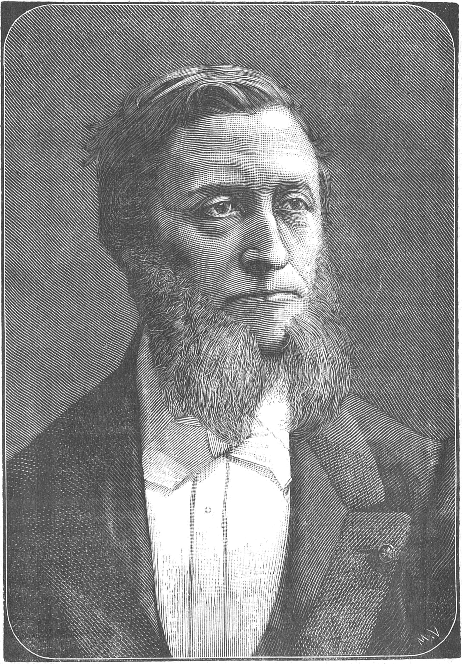 "Le docteur Jean Crocq".